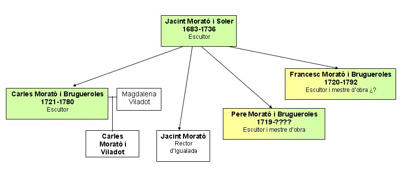 Esquema genealògic d'una de les dues branques de la tercera generació dels Morató, artistes oriünds de Vic